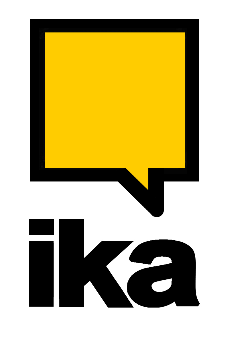 IKA euskaltegi sarearen ikurra.